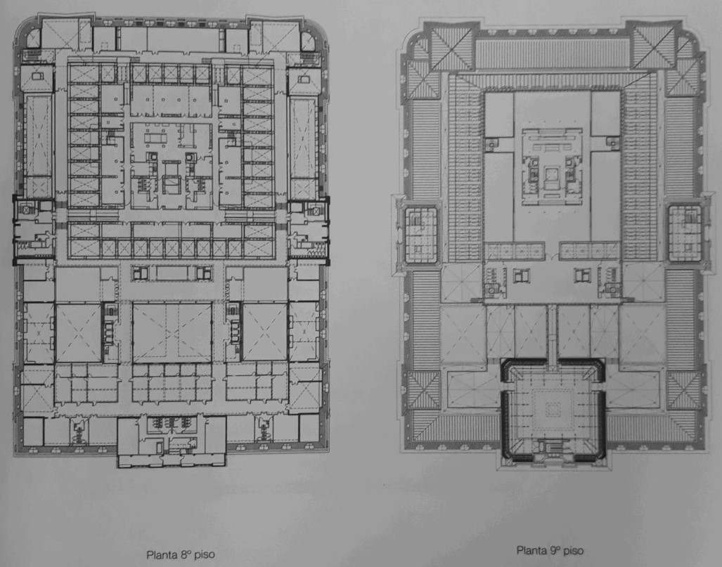 Palacio de correos, proyecto centro cultural del Bicentenario